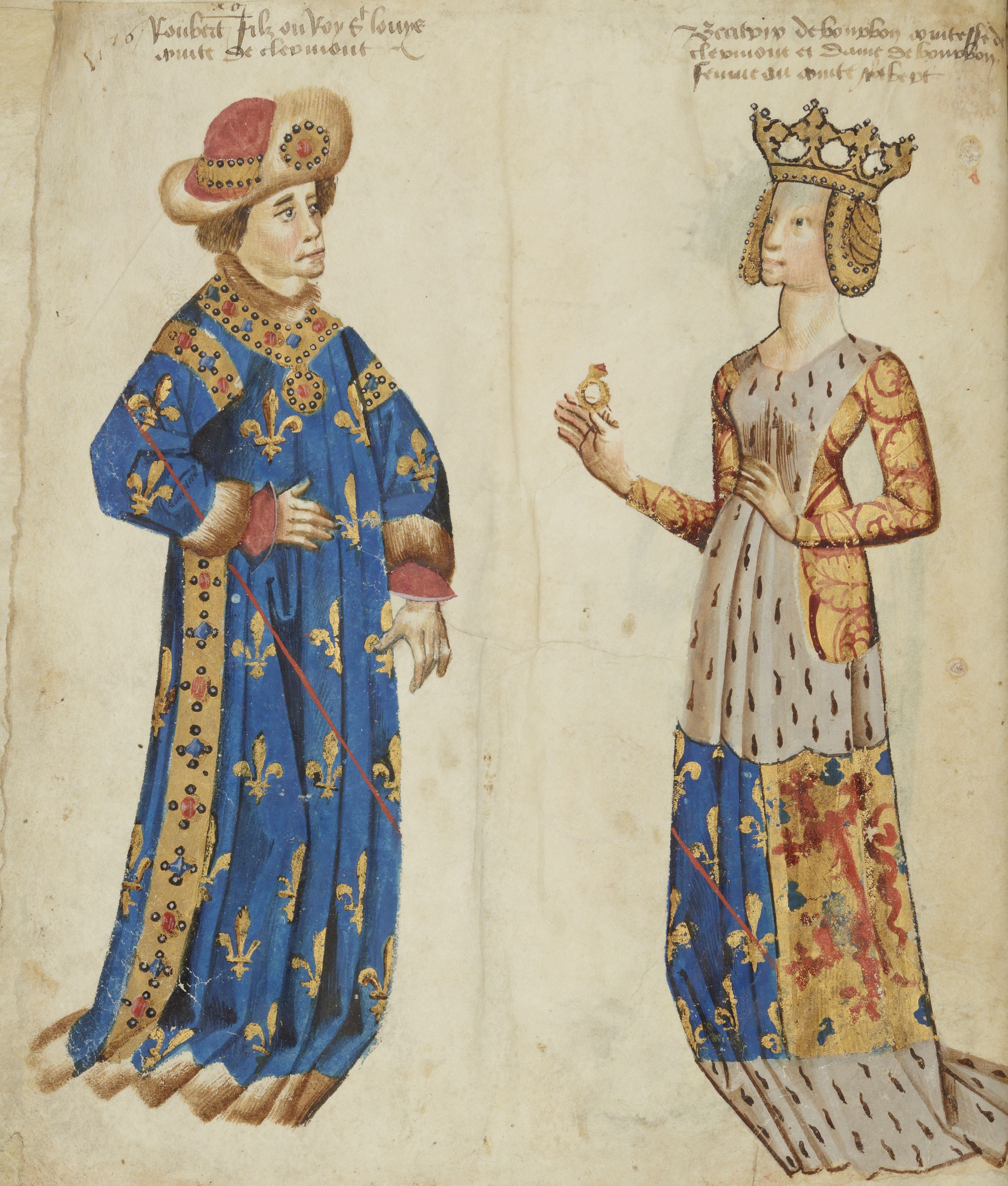 relevé du Armorial d'armes pour Gaignières.